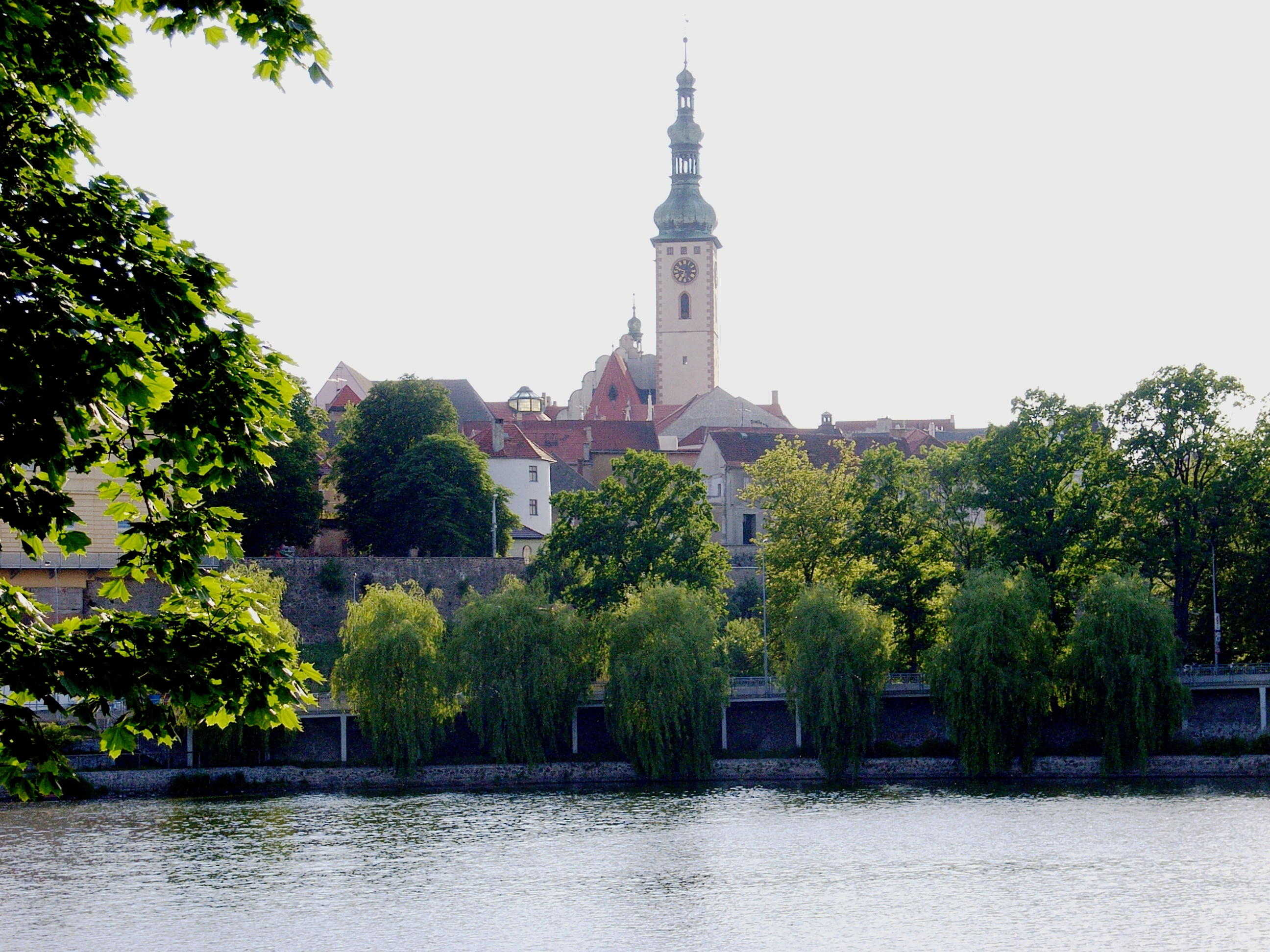 Tábor-hráz Jordánu a část Starého města s kostelem Proměnění těla Páně